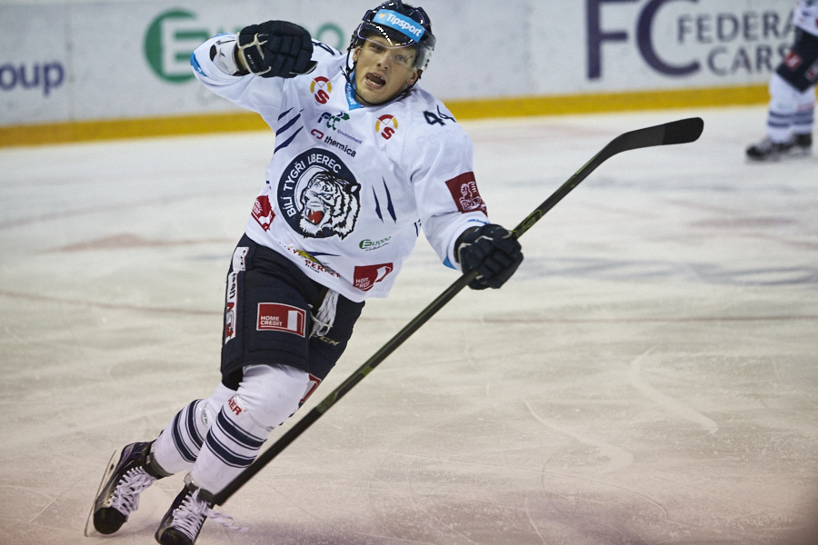 Radim Šimek v dresu Bílích Tygrů Liberec.